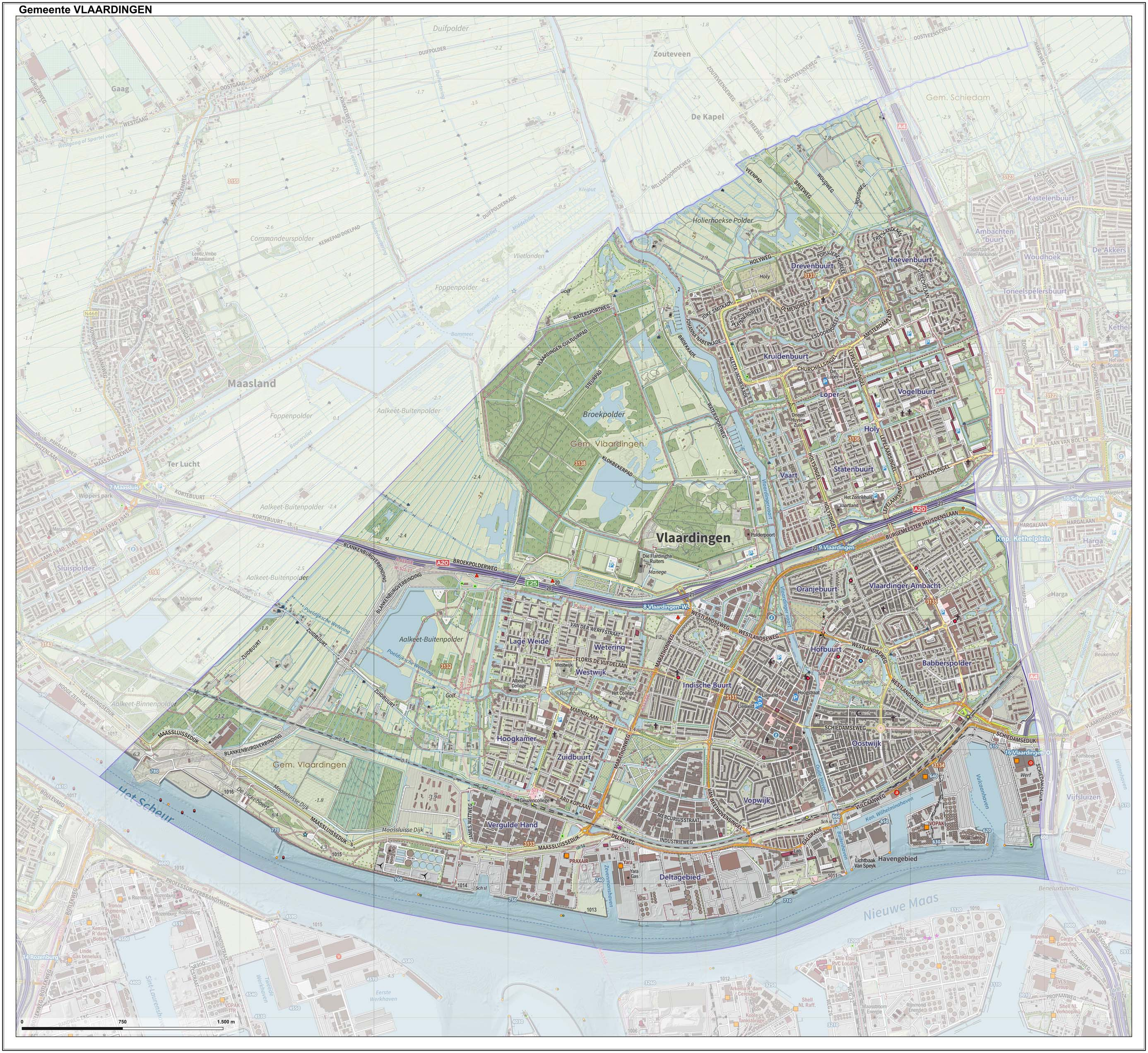 Topografische gemeentekaart. Resolutie: 400 pixels/km. Kaartbeeld samengesteld uit de open geodata van de Top10NL en Top25namen (Kadaster), Creative Commons-BY licentie. Gebouwvlakken uit open geodata BAG extract. Wegen uit de OpenStreetMap, OpenStreetMap community. Reliëfschaduw uit de Actuele Hoogtekaart AHN2. Samenstelling en kleurenschema: Jan-Willem van Aalst, met QGIS. Zie ook de Legenda.